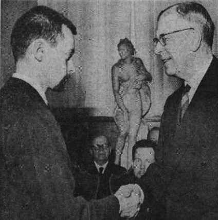 Sune Malmquist mottar medalj för prisämnet i stadsplanekonst från kungen.